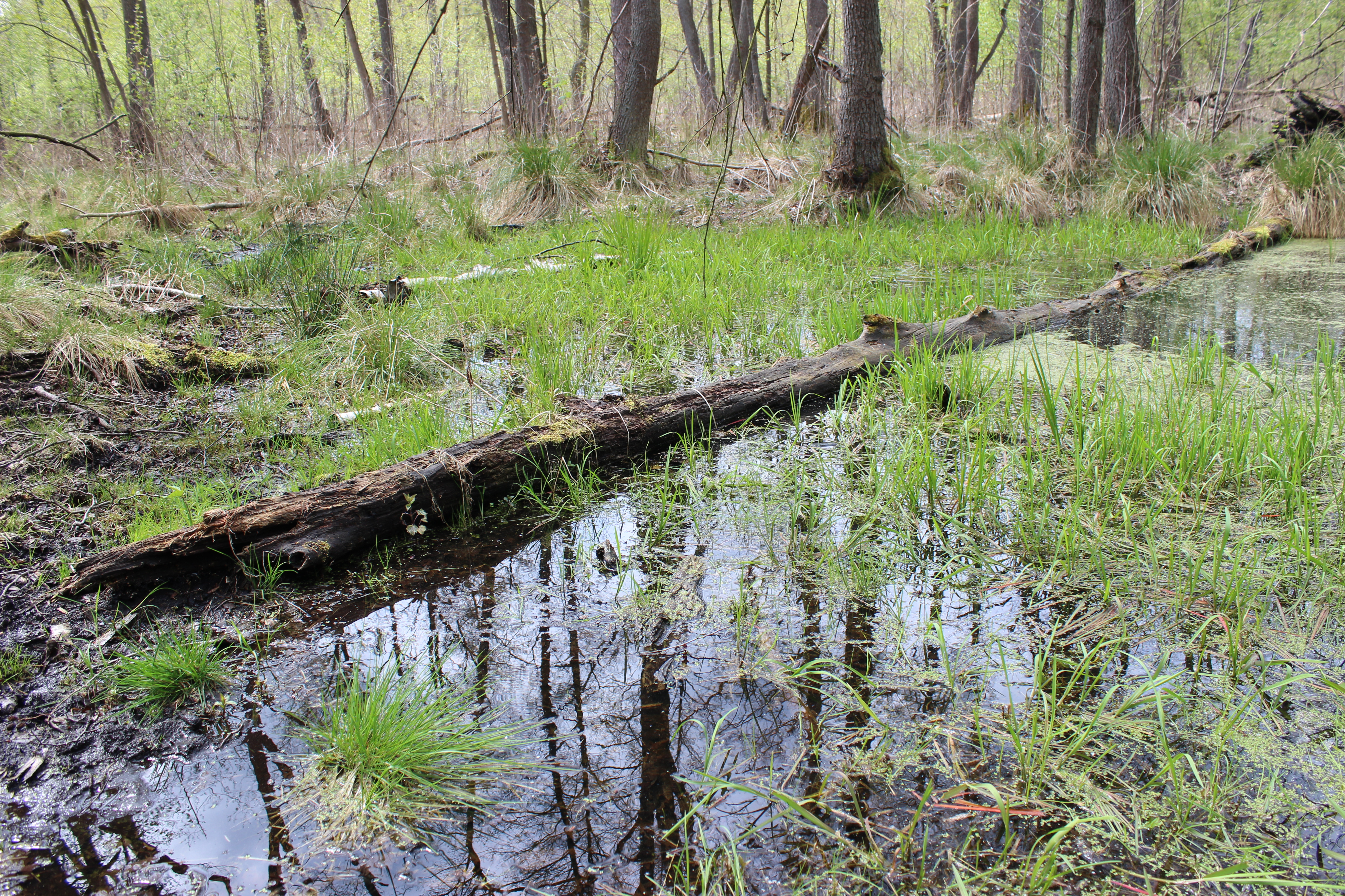 Blick auf einen Moor im Fürstenwalder Stadtluch